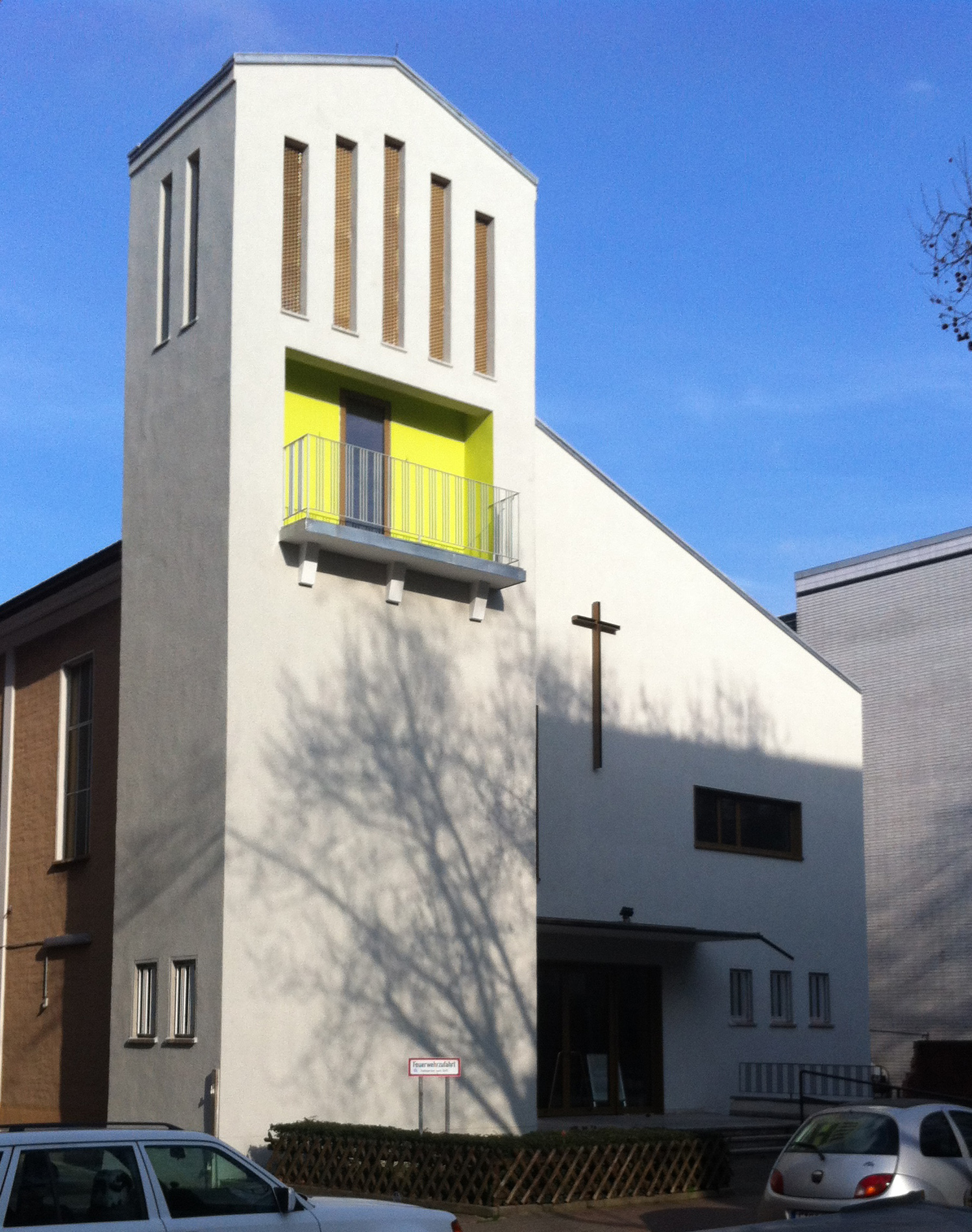 Evangelische Nord-Ost-Kirche in Frankfurt-Ostend, Wingertstraße 19; Bauzeiten 1889, 1958-1960; Architekt: Fritz Coutandin